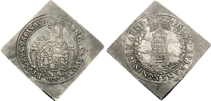 ÖSTERREICH, Salzburg. Wolf Dietrich von Raitenau. Erzbischof, 1587-1612. AR Halbturmtaler Klippe (14,37 g, 12 H). Undatiertes Problem. SANCTVS • RVDBE RTVS • EPS • SALISBV:, St. Rudbert, mit bischöflichen Regalia, sitzend nach oben, leicht links, salzkellerund crozier; Bischöfliches Wappen vor / IN • DNO • SPERANS • NON • INFIRMABOR, dreistufiger Turm in Wellen gesetzt und von Kreuz überragt, von Winden an den Seiten und Hagel und Regen von Gewitterwolken über. Bernhart & Roll 1572; Probszt 810. Gute VF, attraktive graue Tonung.